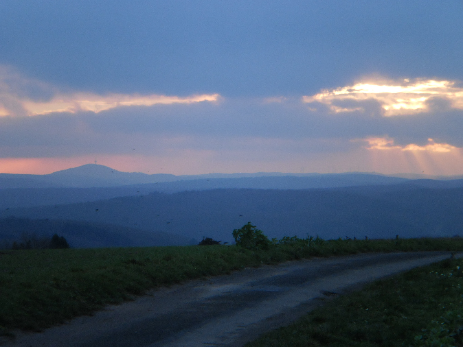 Der Dünsberg am Horizont vom Hasenkopf (Marburger Rücken) mit einem Feldweg, welcher hier von der K 68 abzweigt.